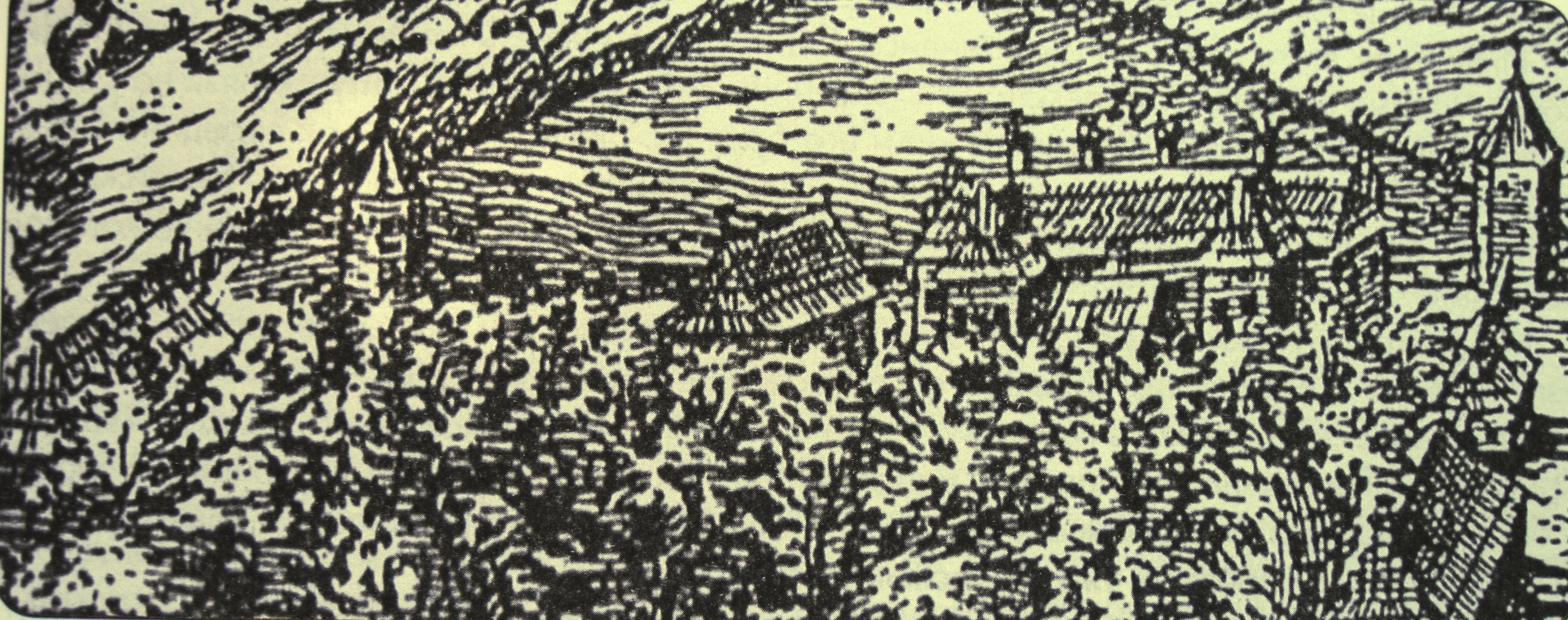 Беларуская (тарашкевіца): Драўляны замак на графюры Нясвіжу Т. Макоўскага